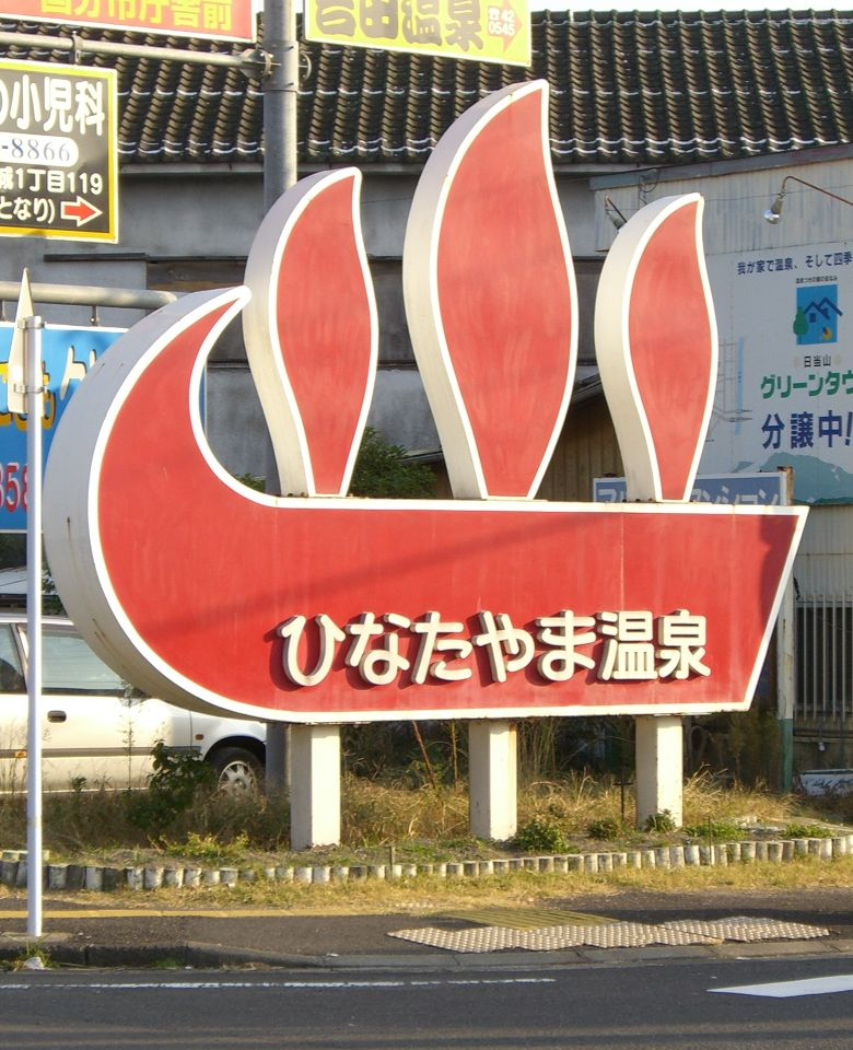 A sign in Hinatayama Onsen at Kirishima City, Kagoshima, Japan.(日当山温泉の看板)